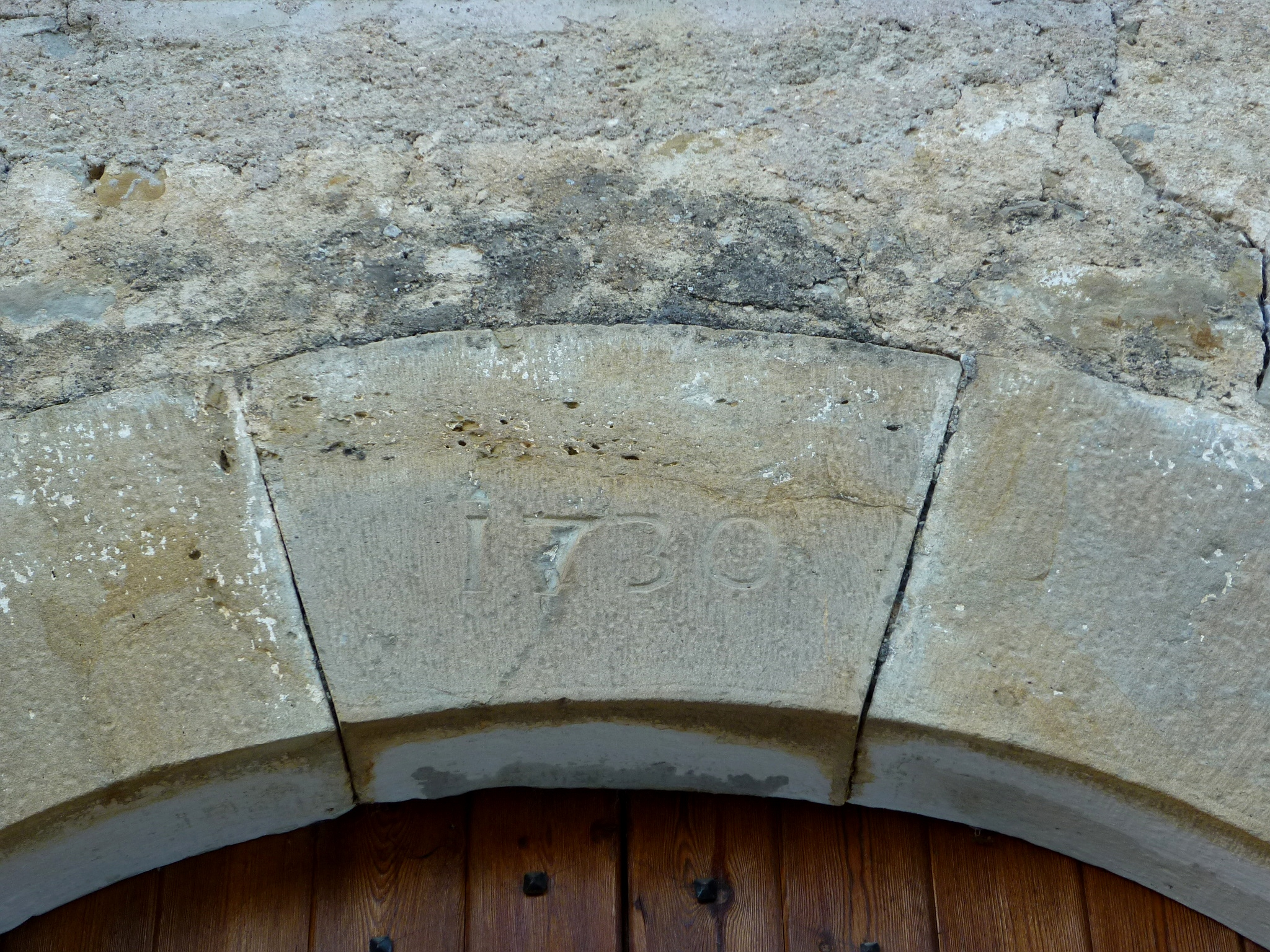 Sant Just i Sant Pastor de la Valldan (Odèn): dovella del portal